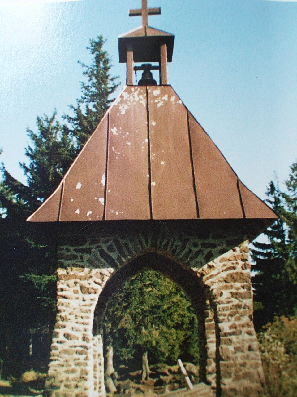 Der Glockenturm auf dem Mittagstein, Bayerischer Wald